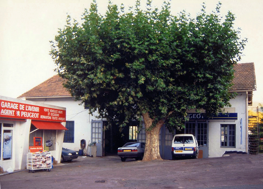 Garage de l´Avenir in Gonfaron